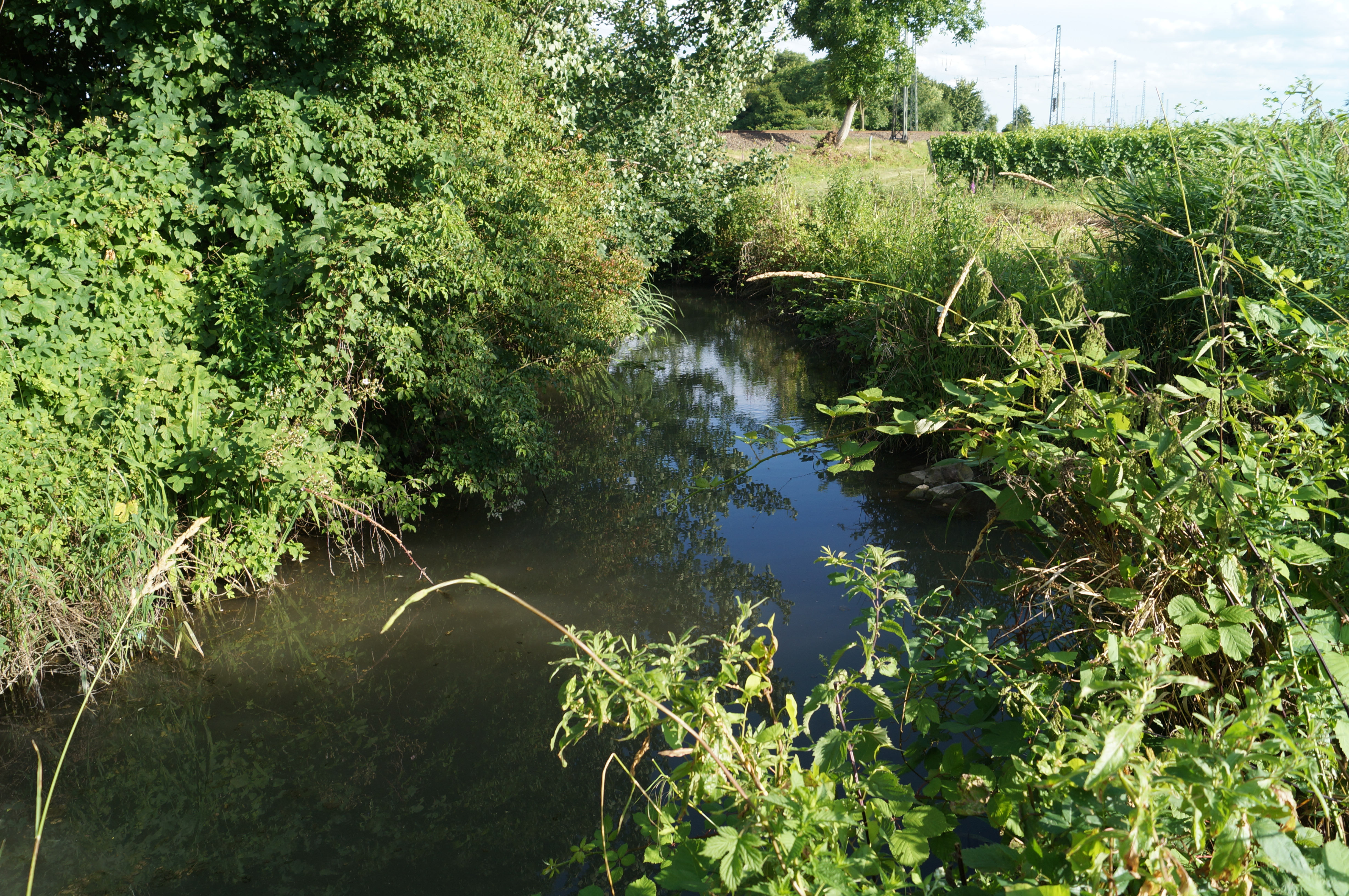 Der Bechtheimer Kanal in Guntersblum in der Nähe des Guntersblumer Bahnhofs an der Bahnstrecke Mainz–Mannheim, Blickrichtung Südost